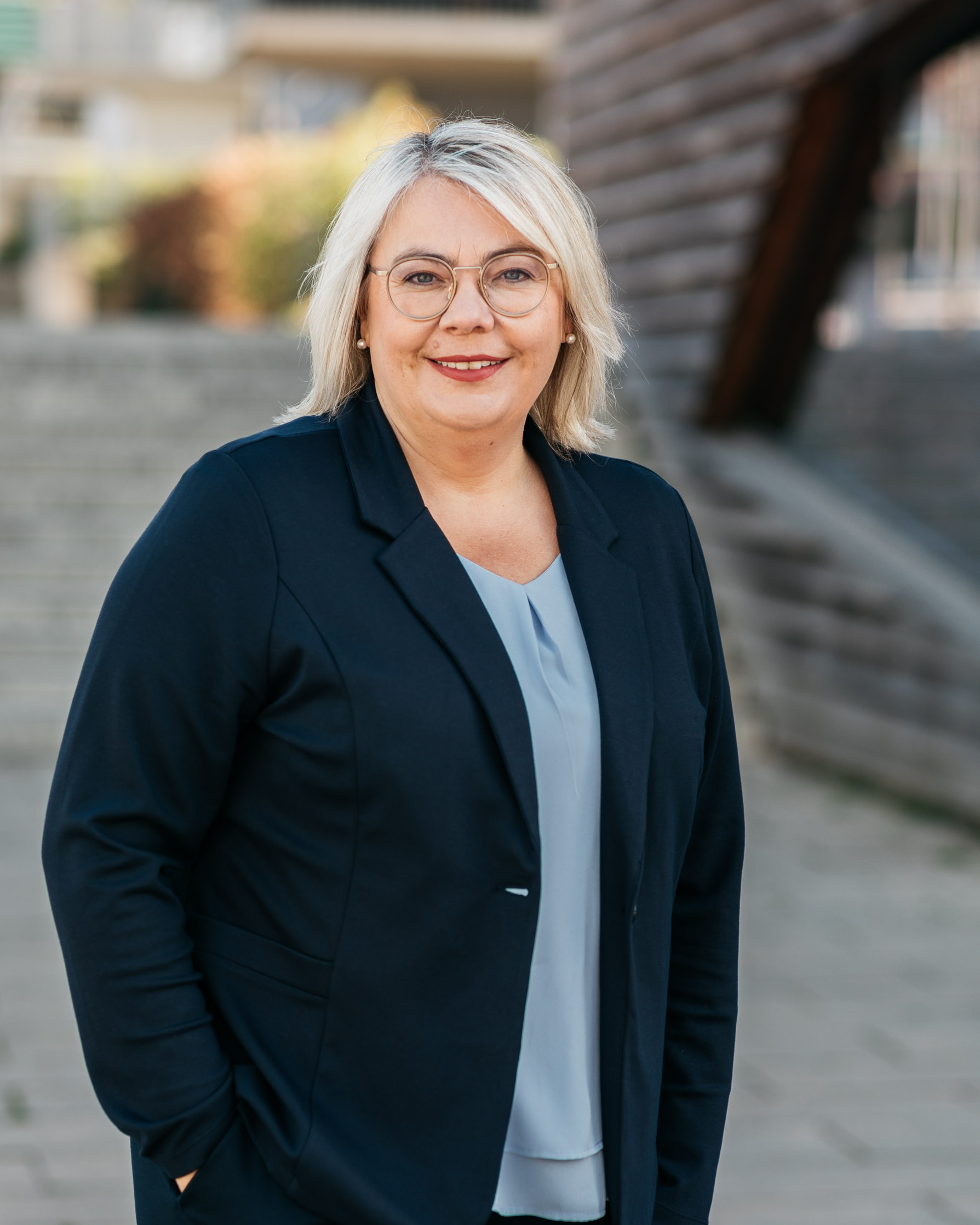 Silke Seif MdHB